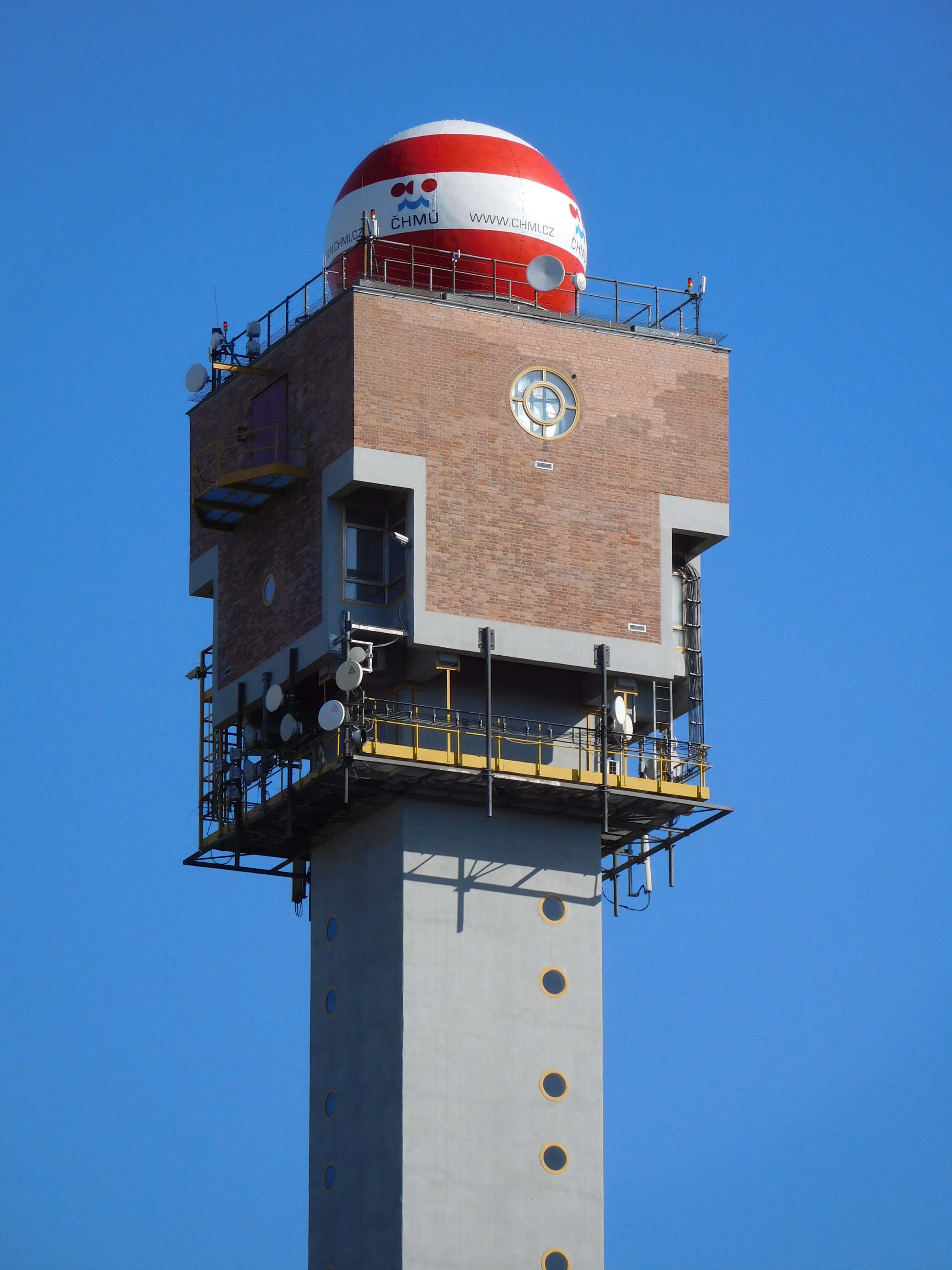 Praha - Kamýk, věž ČHMÚ